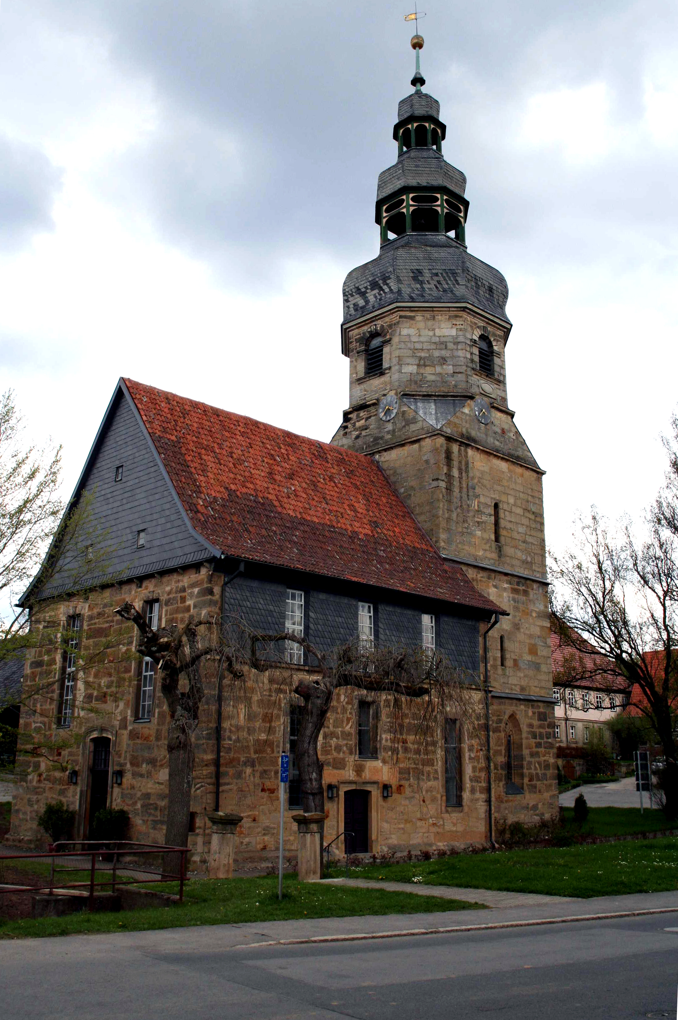 Kirche Großheirath Kirche Großheirath im Landkreis Coburg